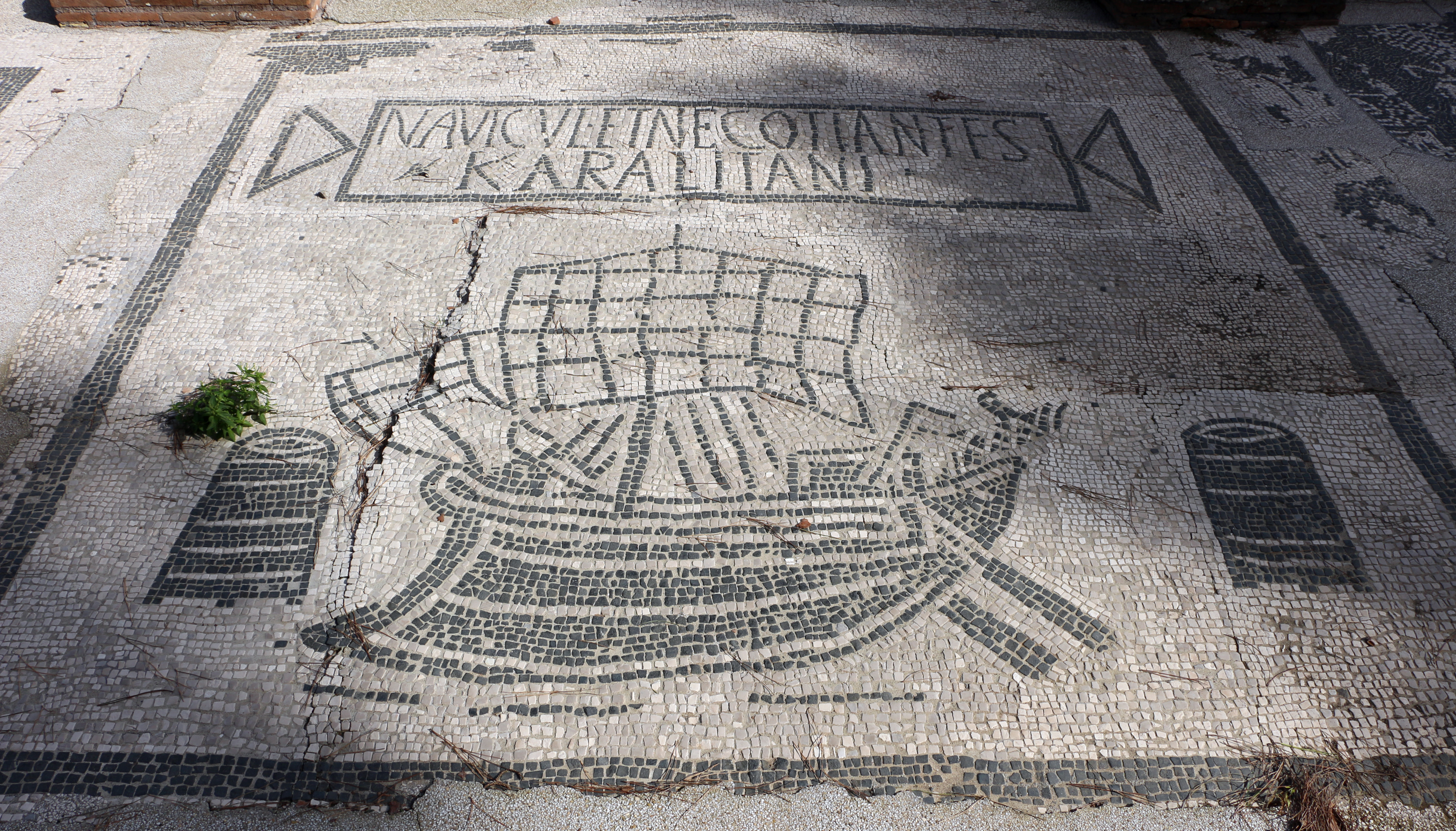 Ostia, piazzale delle corporazioni, trasporti navali cagliaritani.JPG